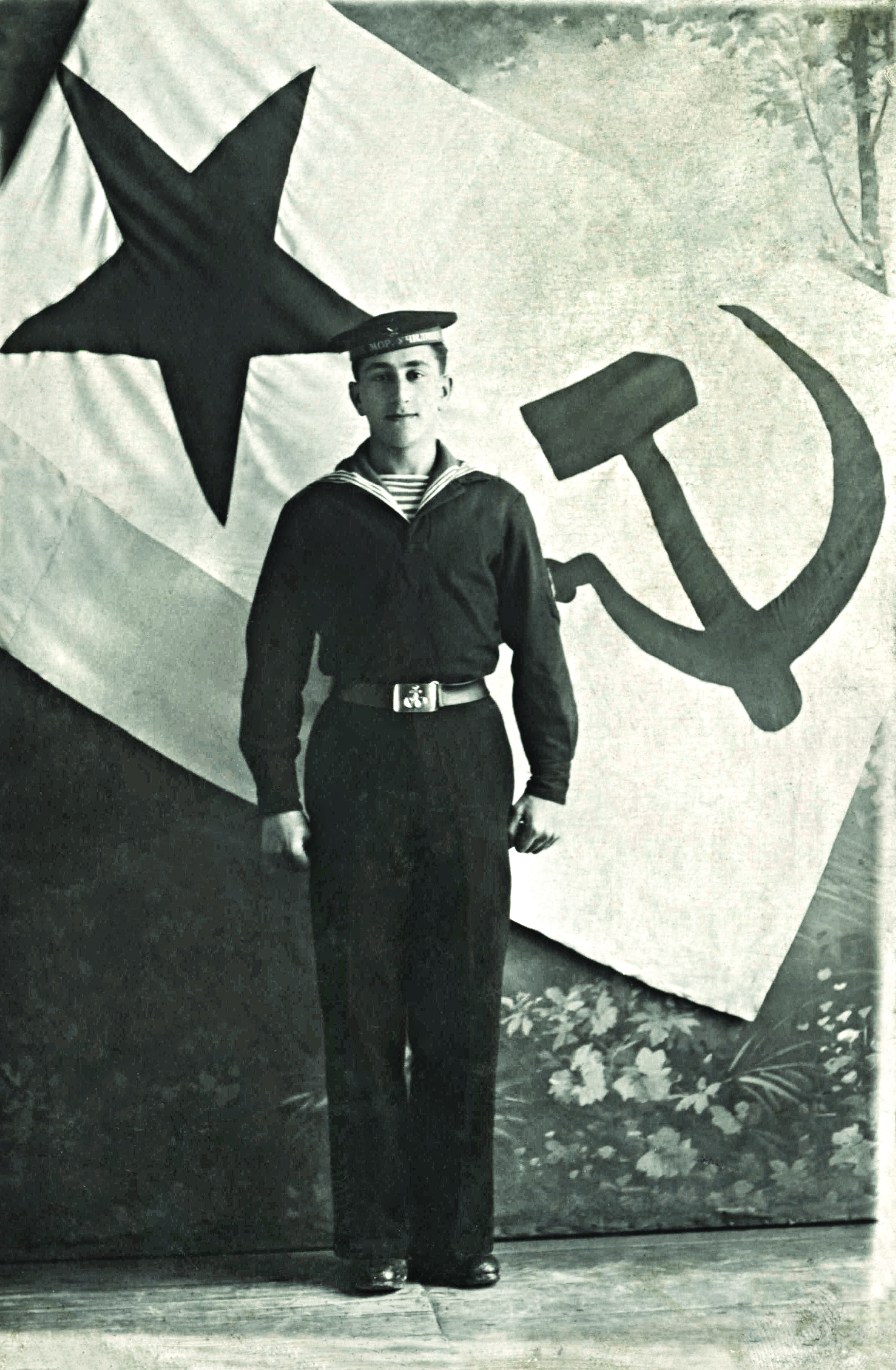 Qara Dəniz Ali Hərbi – Dəniz Məktəbinin müdavimi Cəlil Cavadov